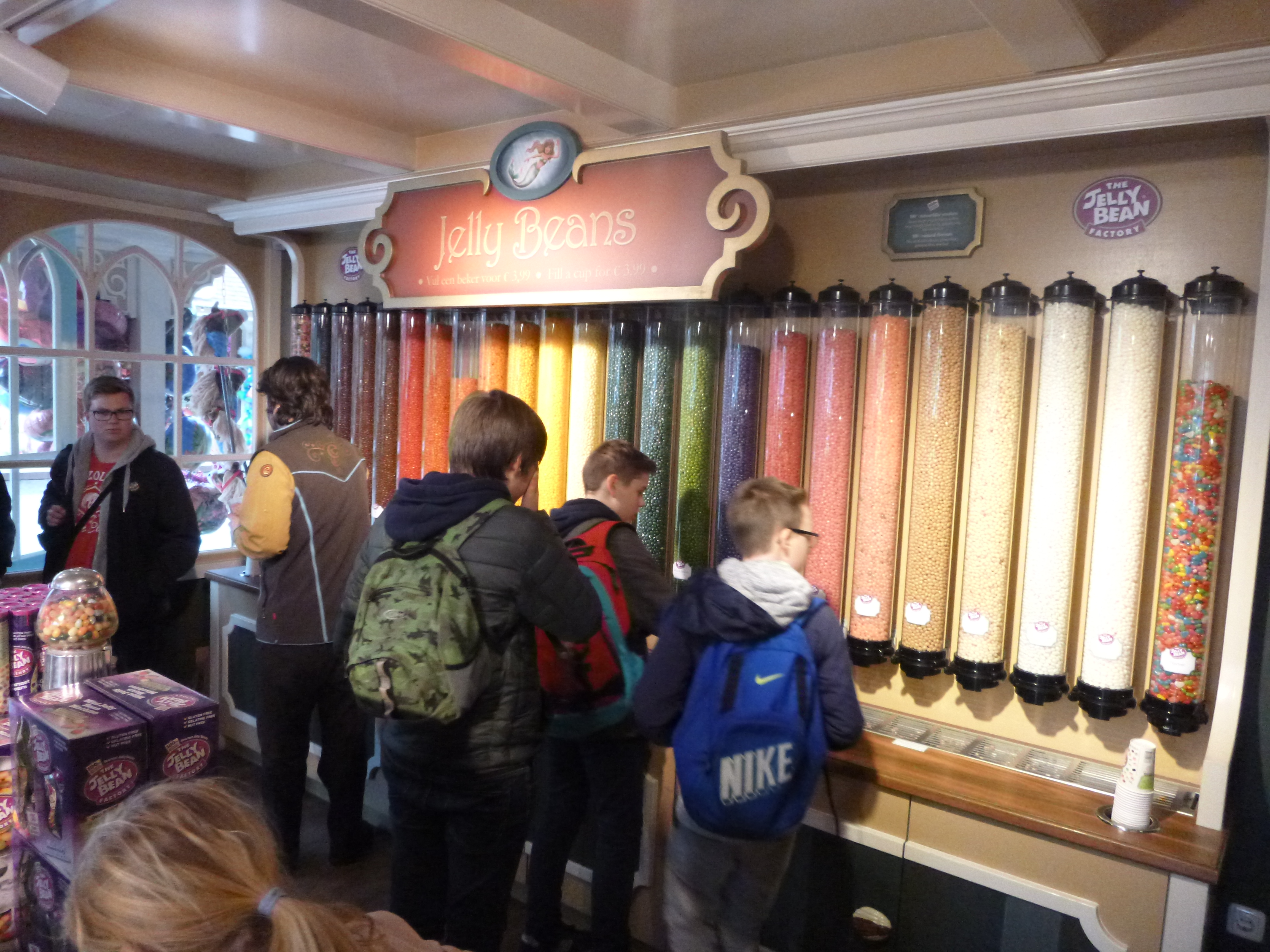 Magasin "Verleiding" de la Game Gallery